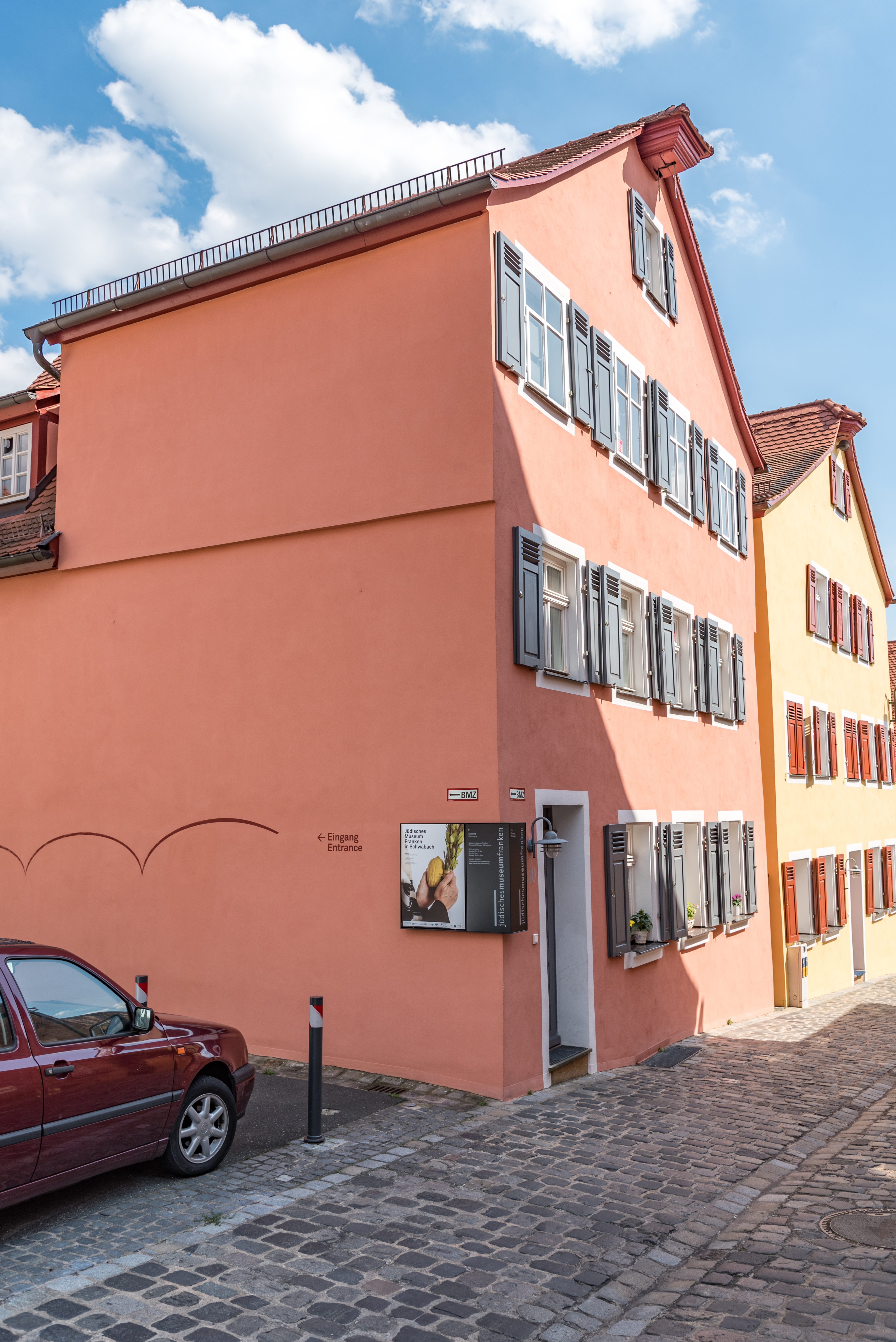 Schwabach, Synagogengasse 10